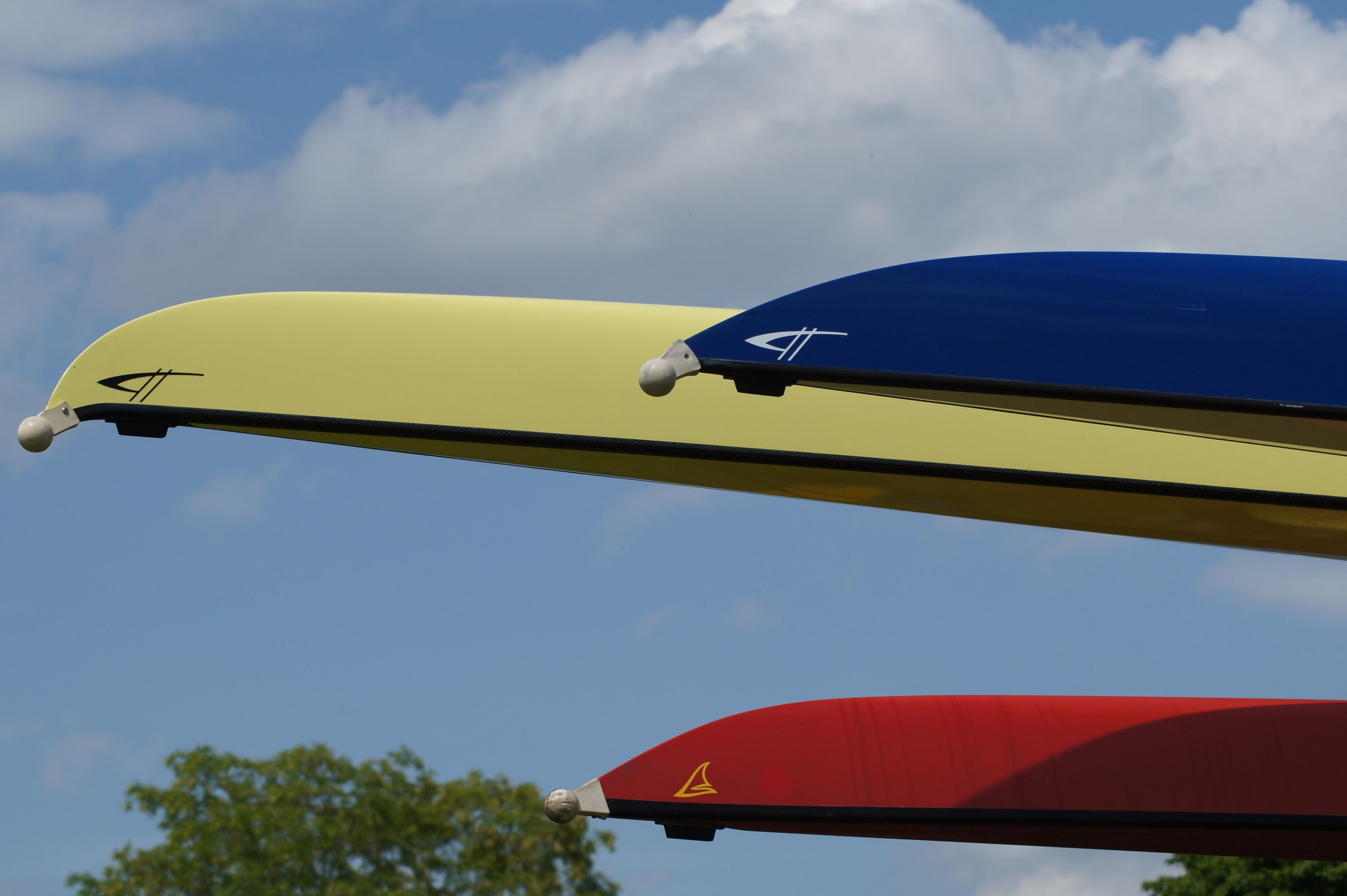 Farbenpiele Ruderboote RC Hansa Dortmund